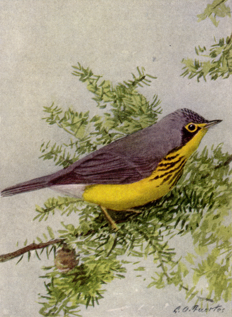 Canada Warbler (Wilsonia canadensis).